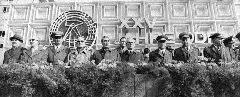 Factual corrections and alternative descriptions are encouraged separately from the original description. Additionally errors can be reported at this page to inform the Bundesarchiv. Original historic description: Berlin, 25. Jahrestag DDR-Gründung, Parade ADN-ZB Spremberg 7.10.74 Berlin: 25. Jahrestag -Ehrenparade der Nationalen Volksarmee auf der Karl-Marx-Allee. Blick auf einen Teil der Ehrentribüne: 6.v.l.: Erich Honecker, Erster Sekretär des ZK der SED; 5.v.l.: Leonid I. Breshnew, Generalsekretär der KPdSU; 4.v.l. Willi Stoph, Vorsitzender des Staatsrates der DDR; 2.v.l.: Horst Sindermann, Vorsitzender des Ministerrates der DDR.